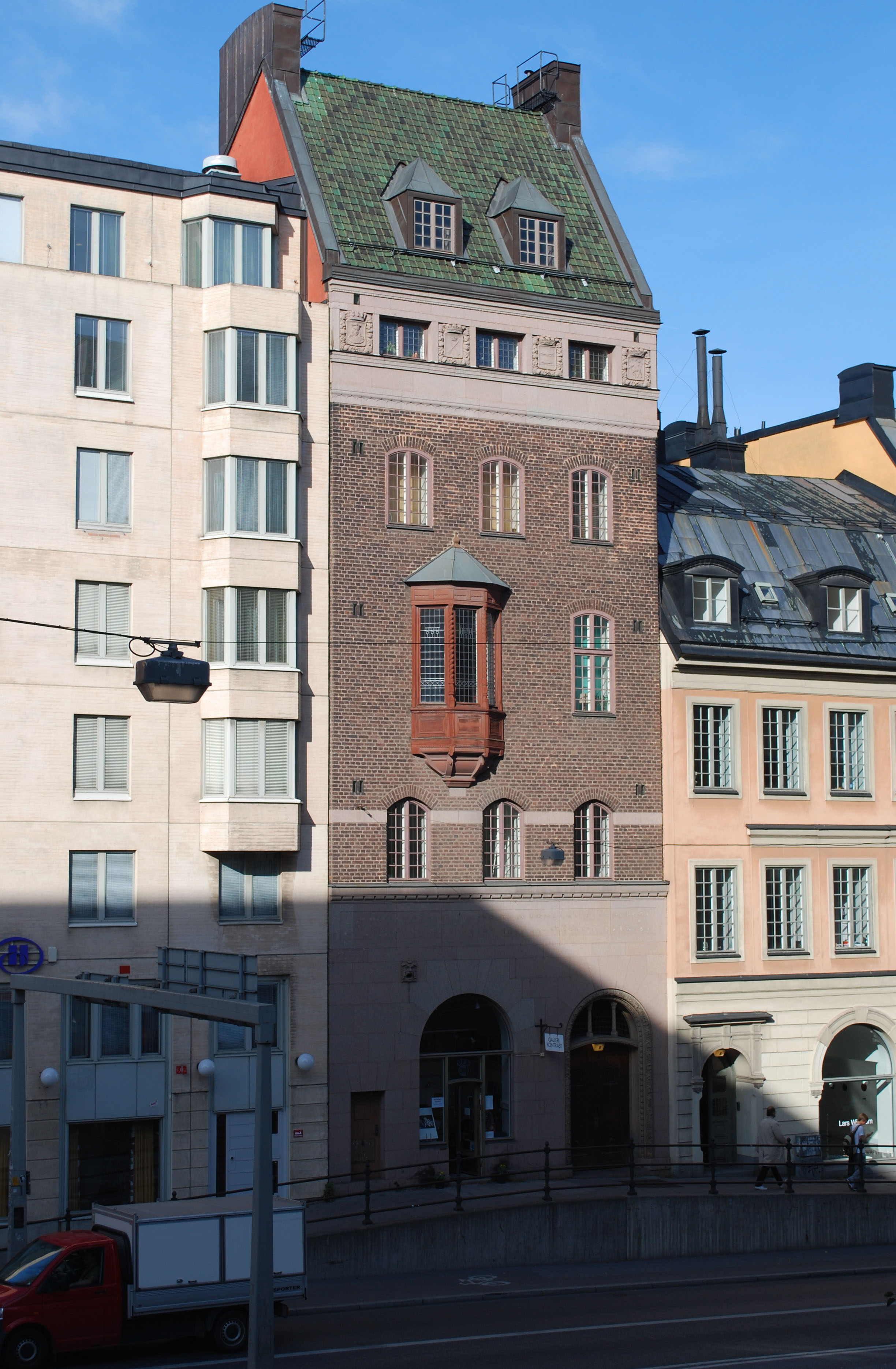 Hornsgatan 8